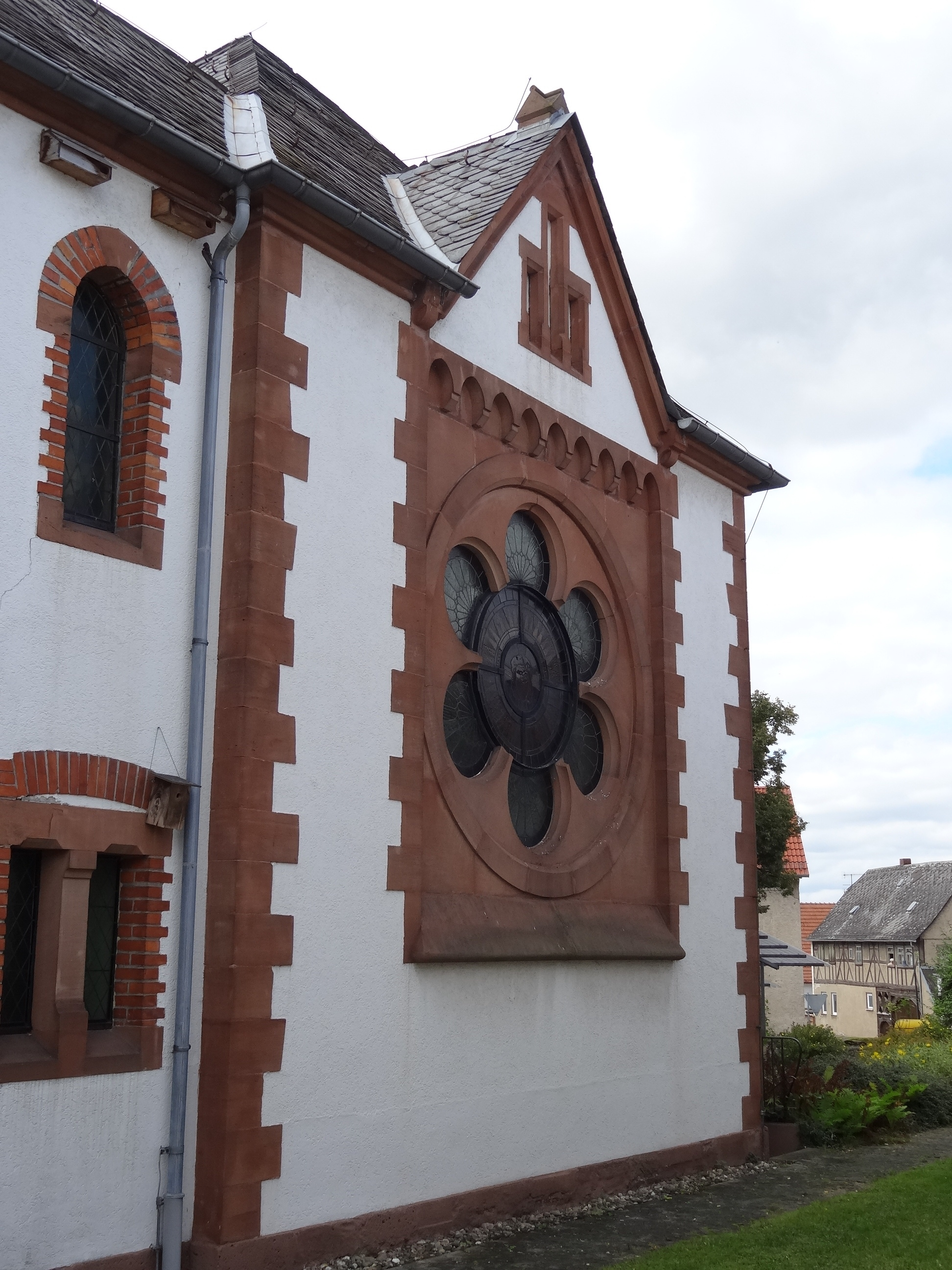 Evangelische Kirche Lützellinden